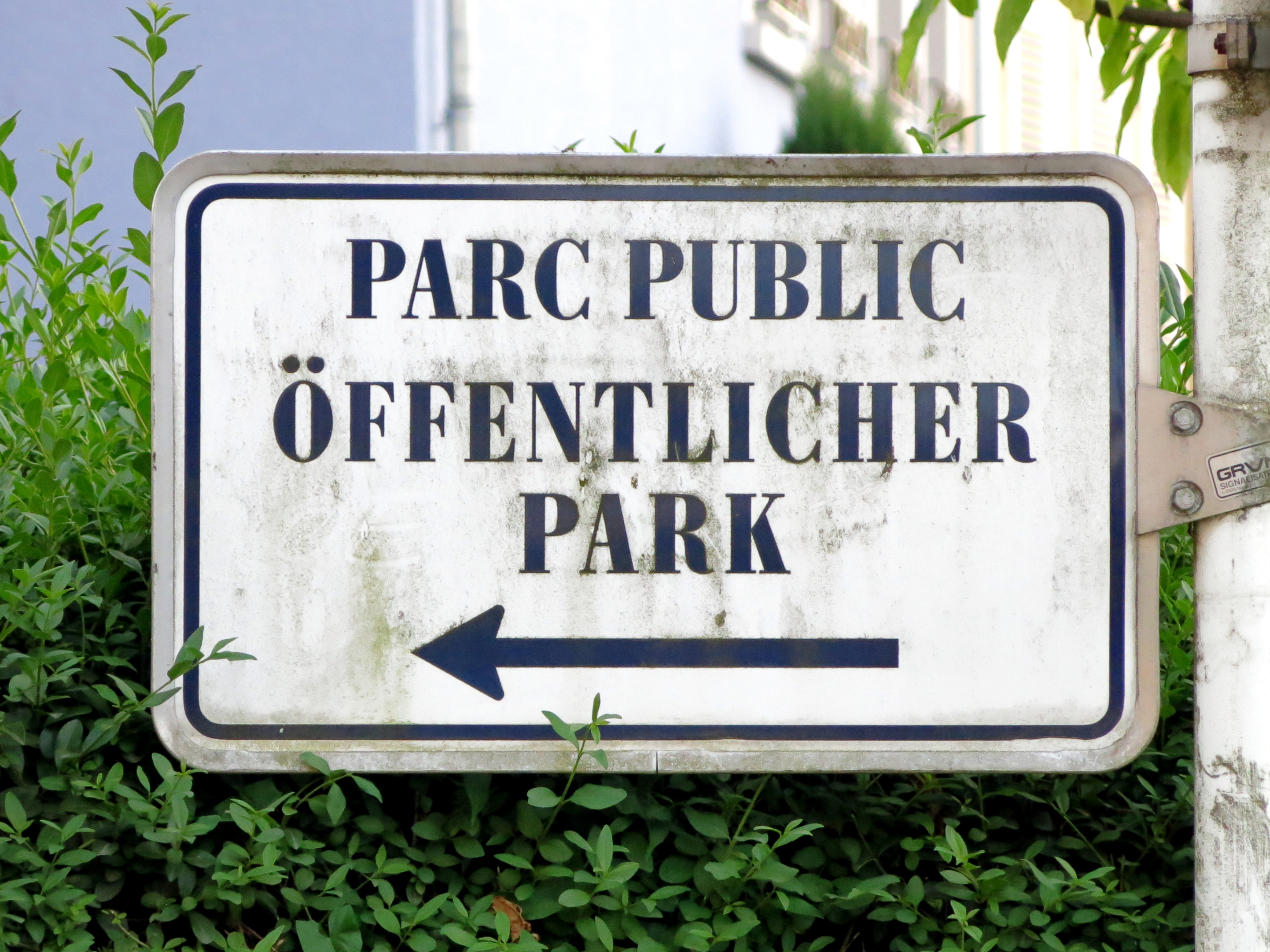 Vun der Rue Nicolas Welter an der Gemengepark zu Miersch.